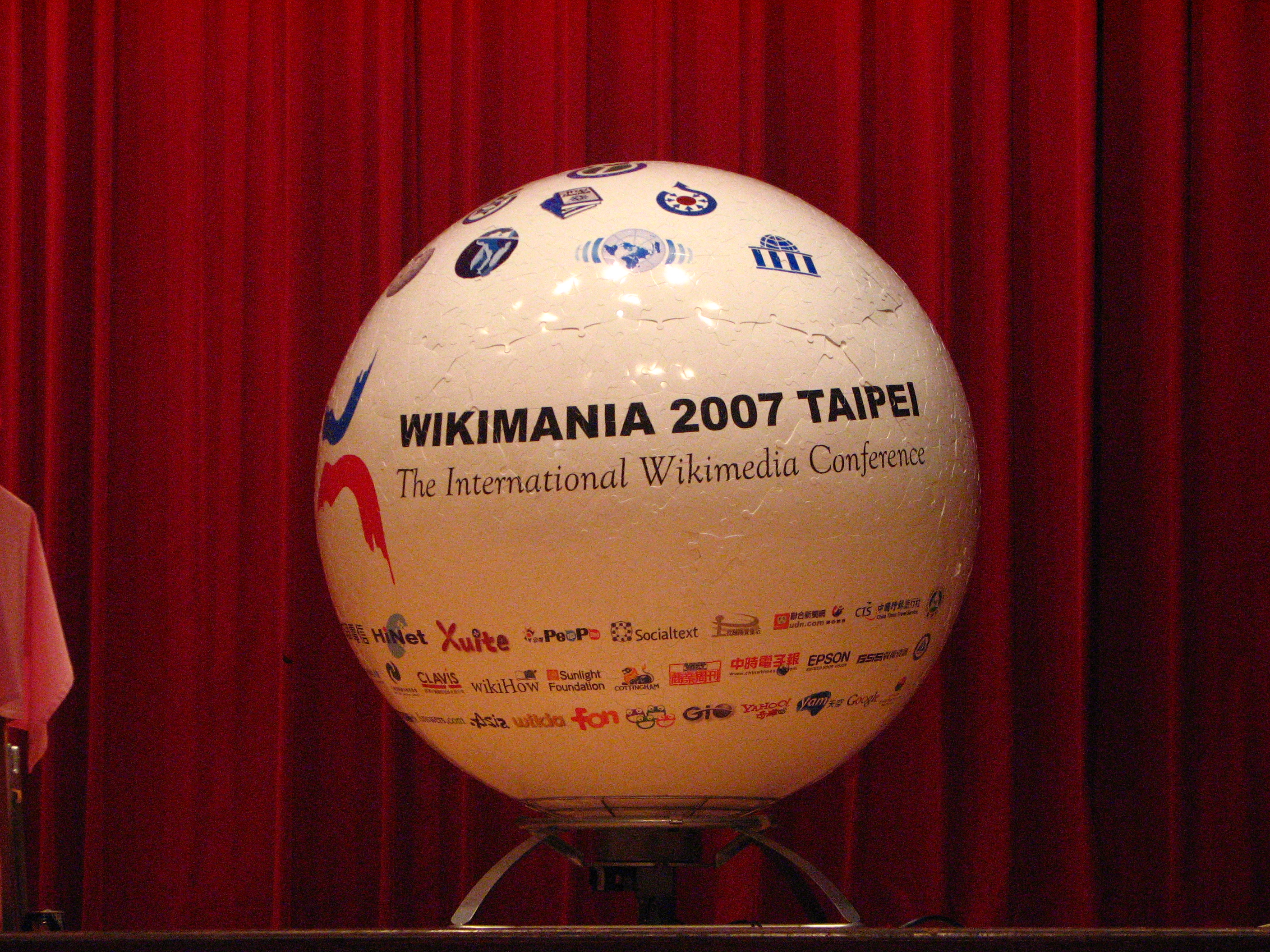 Wikiball at Wikimania Taipei 2007